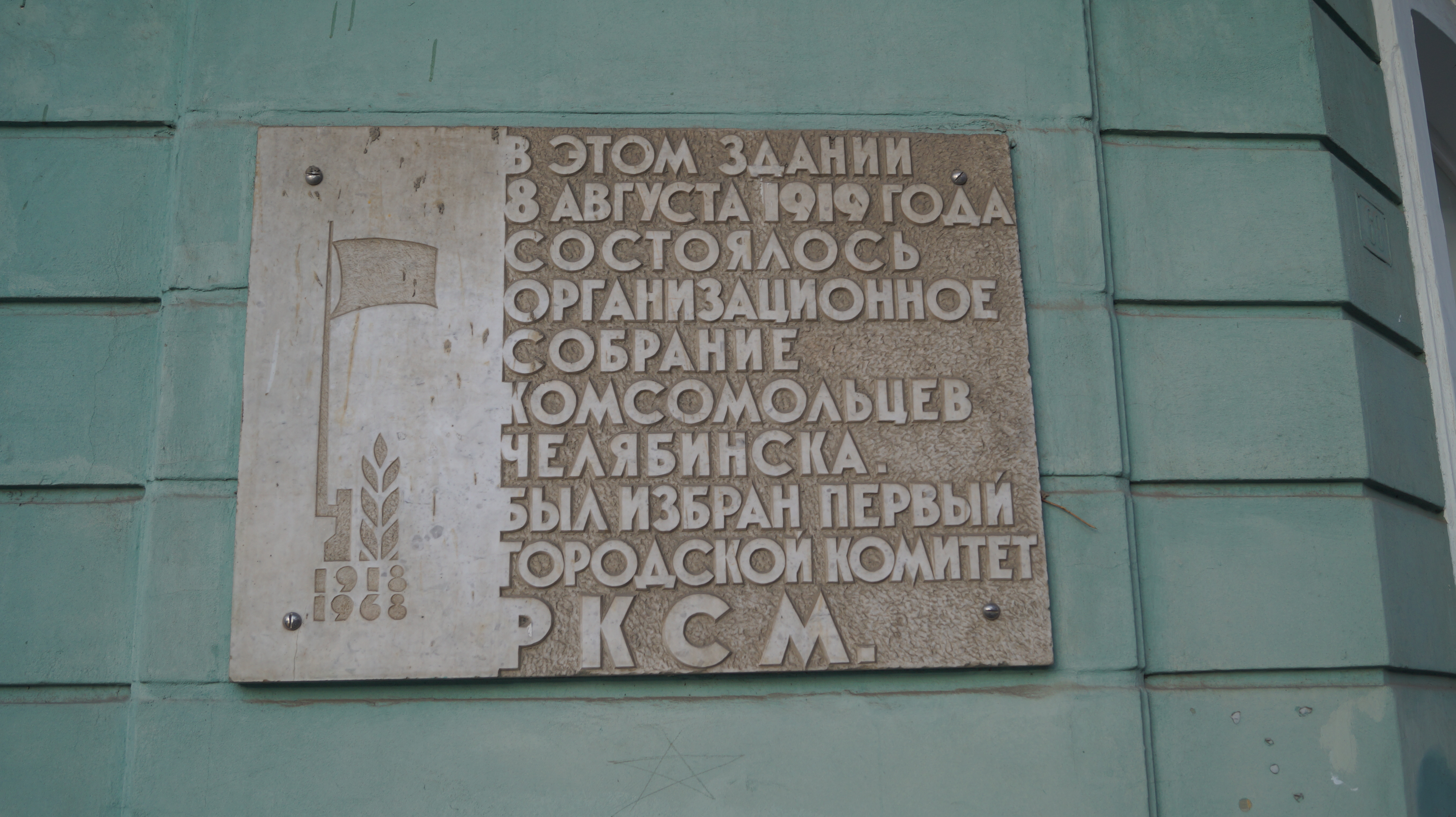 Памятная доска на доме Архипова в Челябинске.